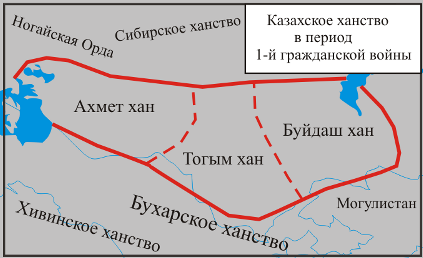 Карта 1-й гражданской войны в Казахском ханстве